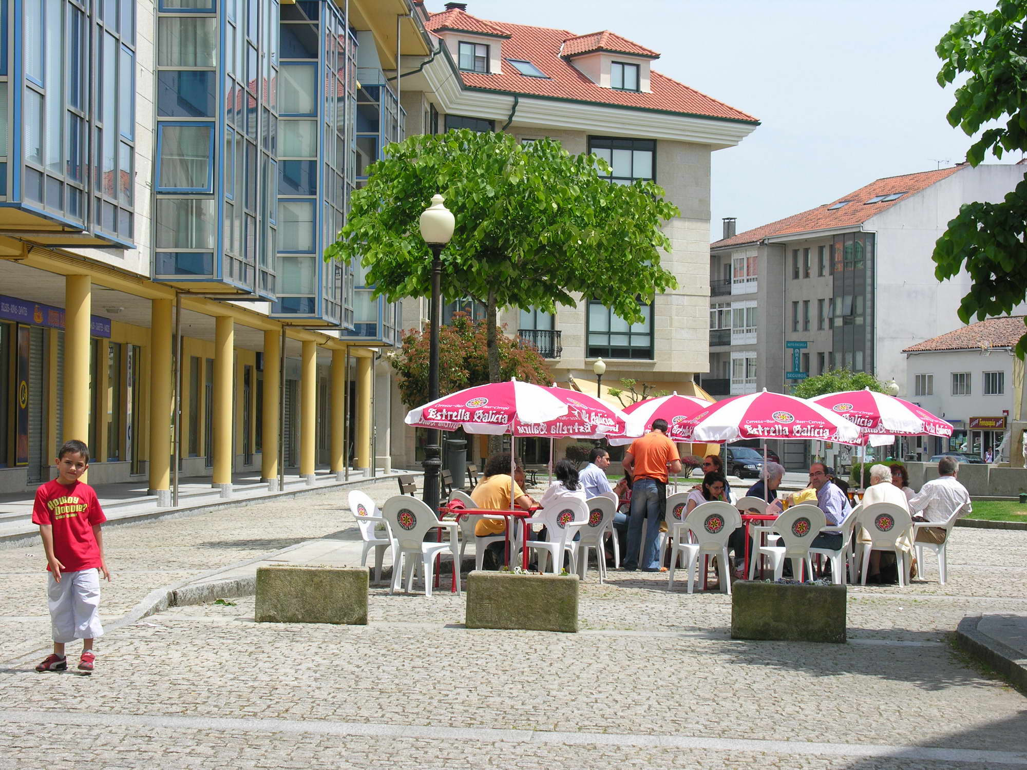 Praza de Bertamiráns, Ames, Galicia Publish by= Luis Miguel Bugallo Sánchez. Self made